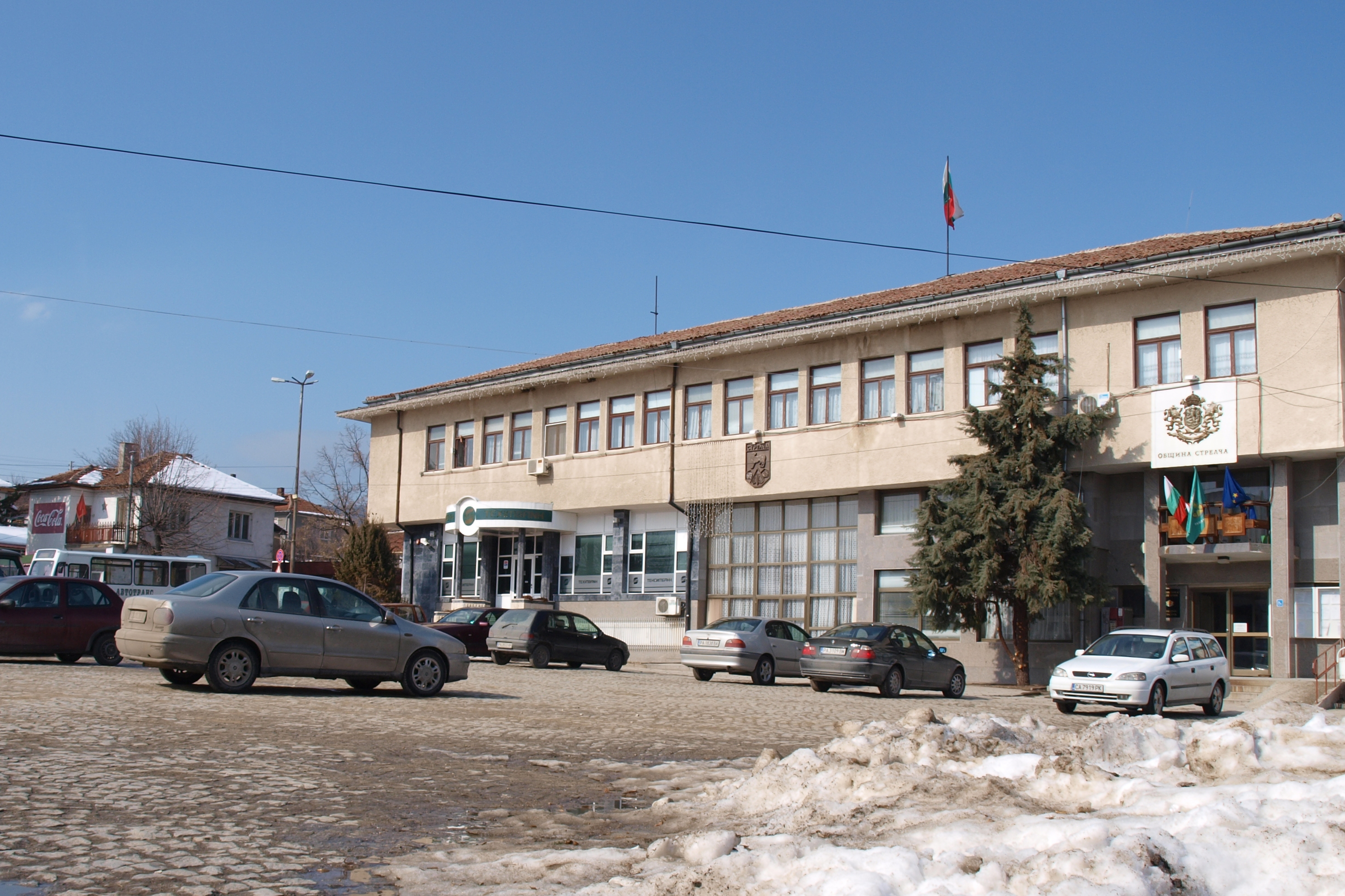 Общината в Стрелча.